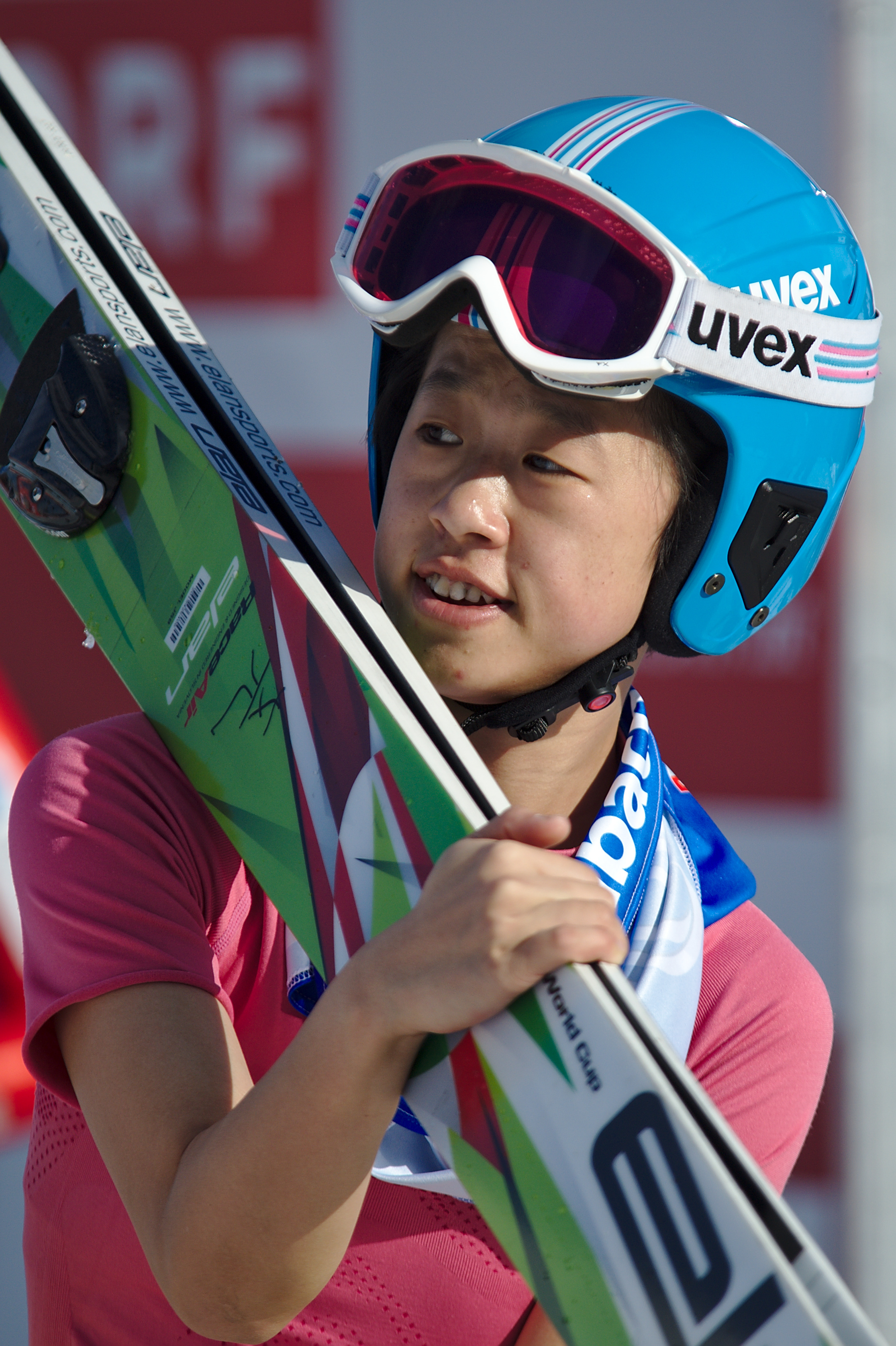 FIS Ski Jumping World Cup Ladies Hinzenbach 2017. Bild zeigt Li Xueyao (CHN)